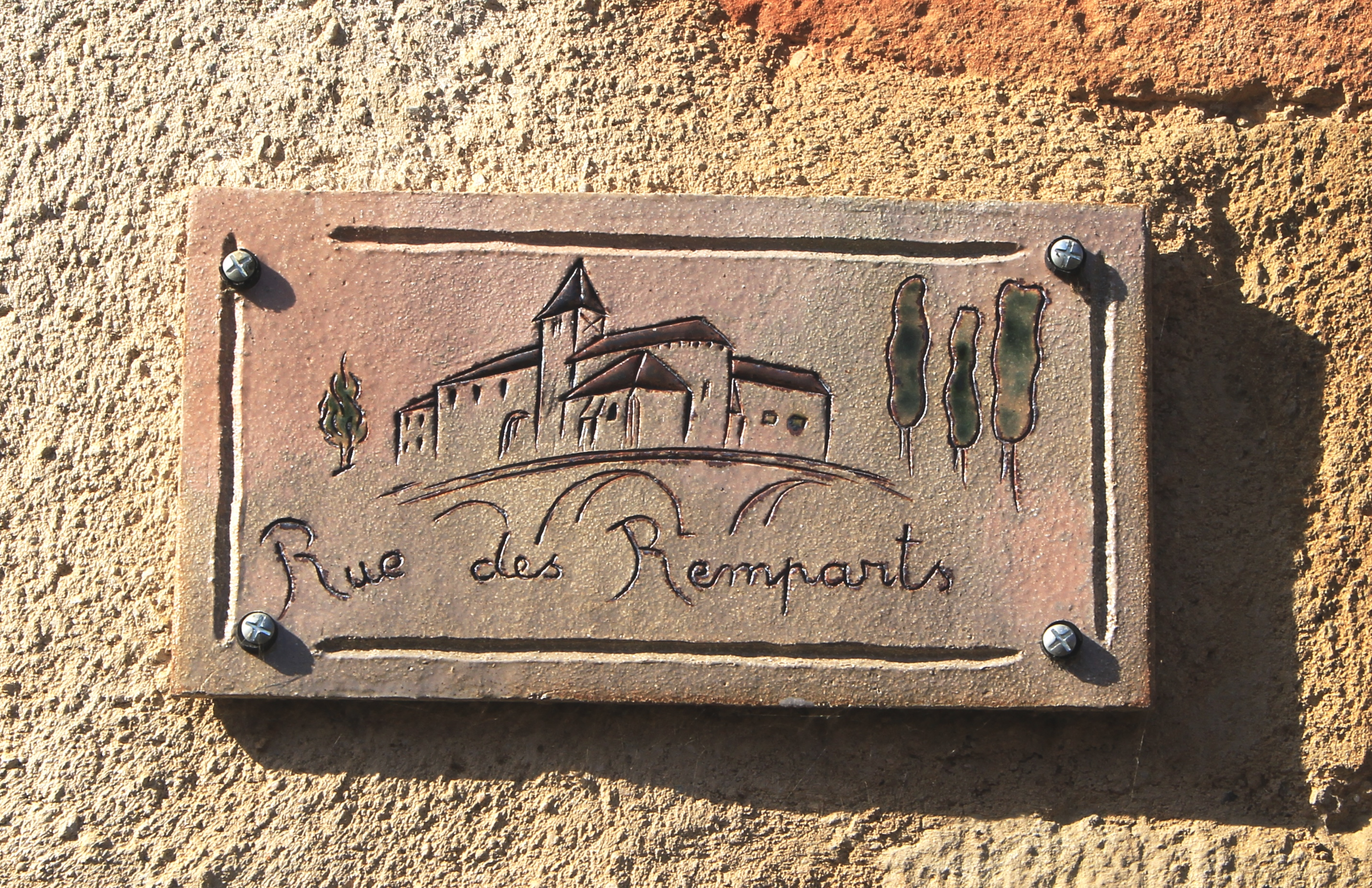 Rue du village de Saint-Sever-de-Rustan (Hautes-Pyrénées)